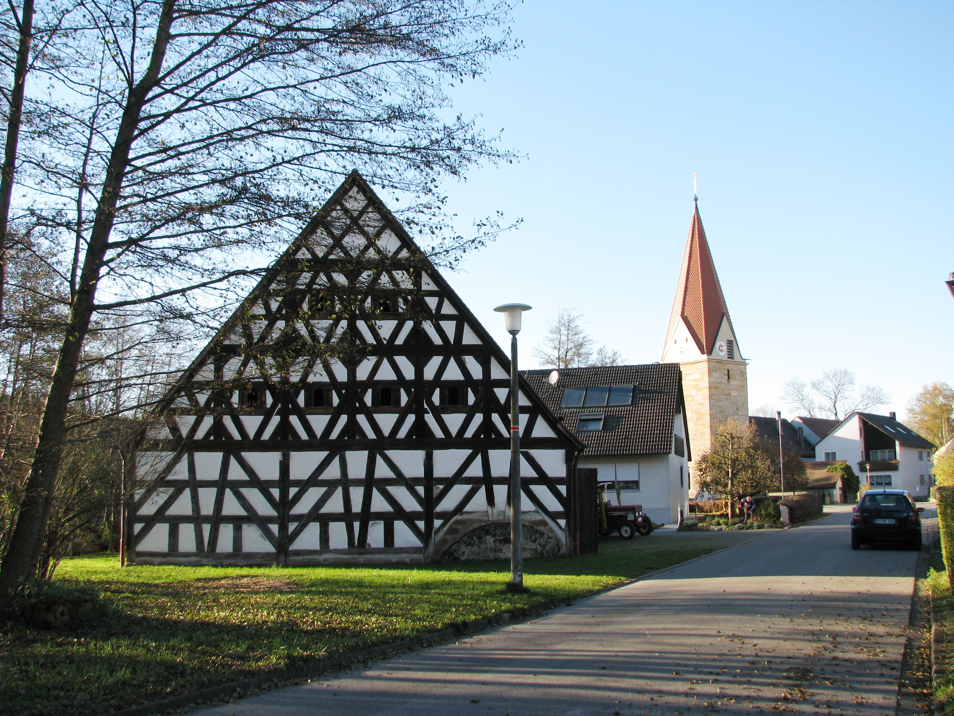 Hofstetten, Ortsteil von Hilpoltstein im mittelfränkischen Landkreis Roth, Fachwerkscheune